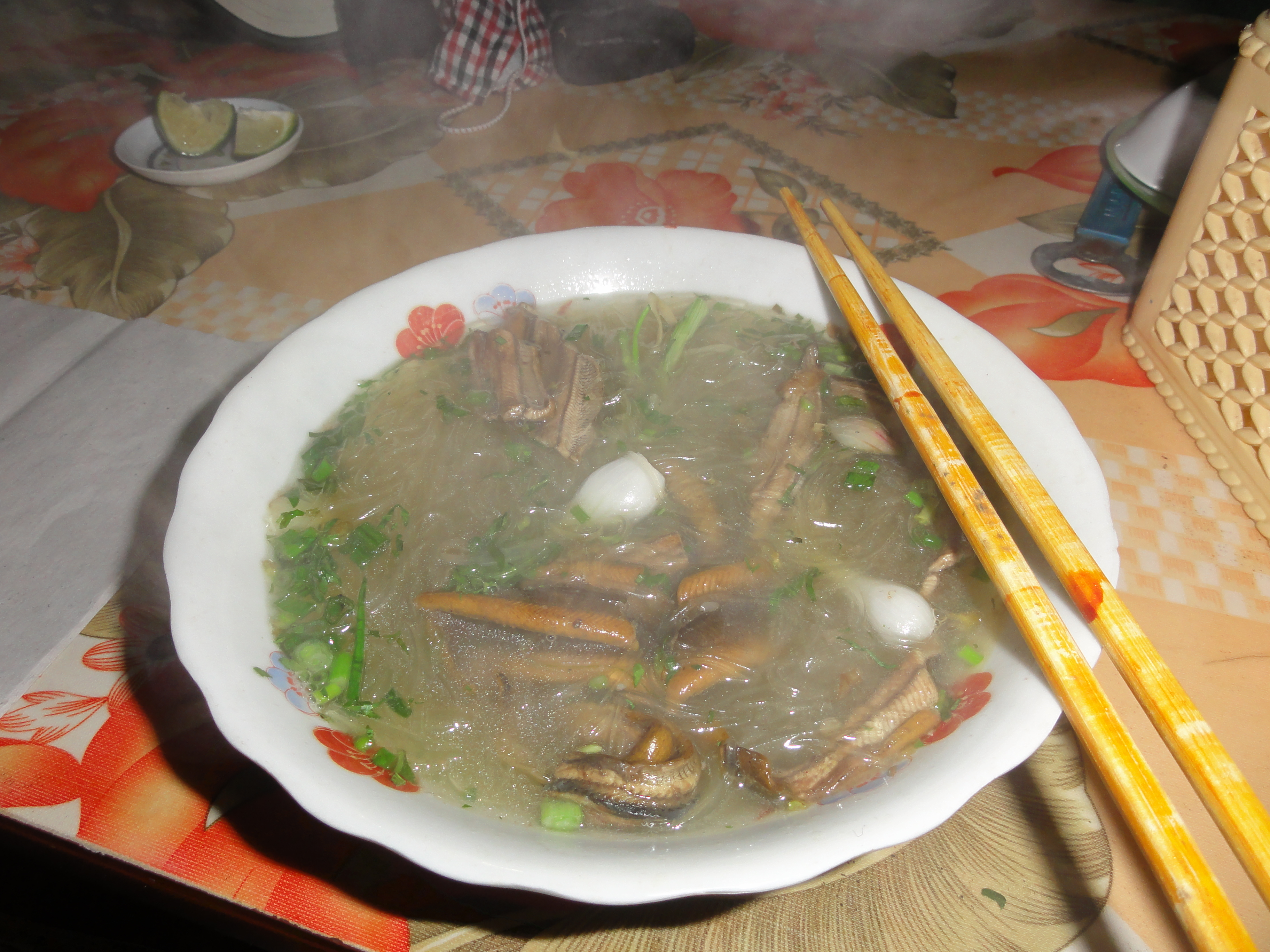 Bắc Giang - tết 2012